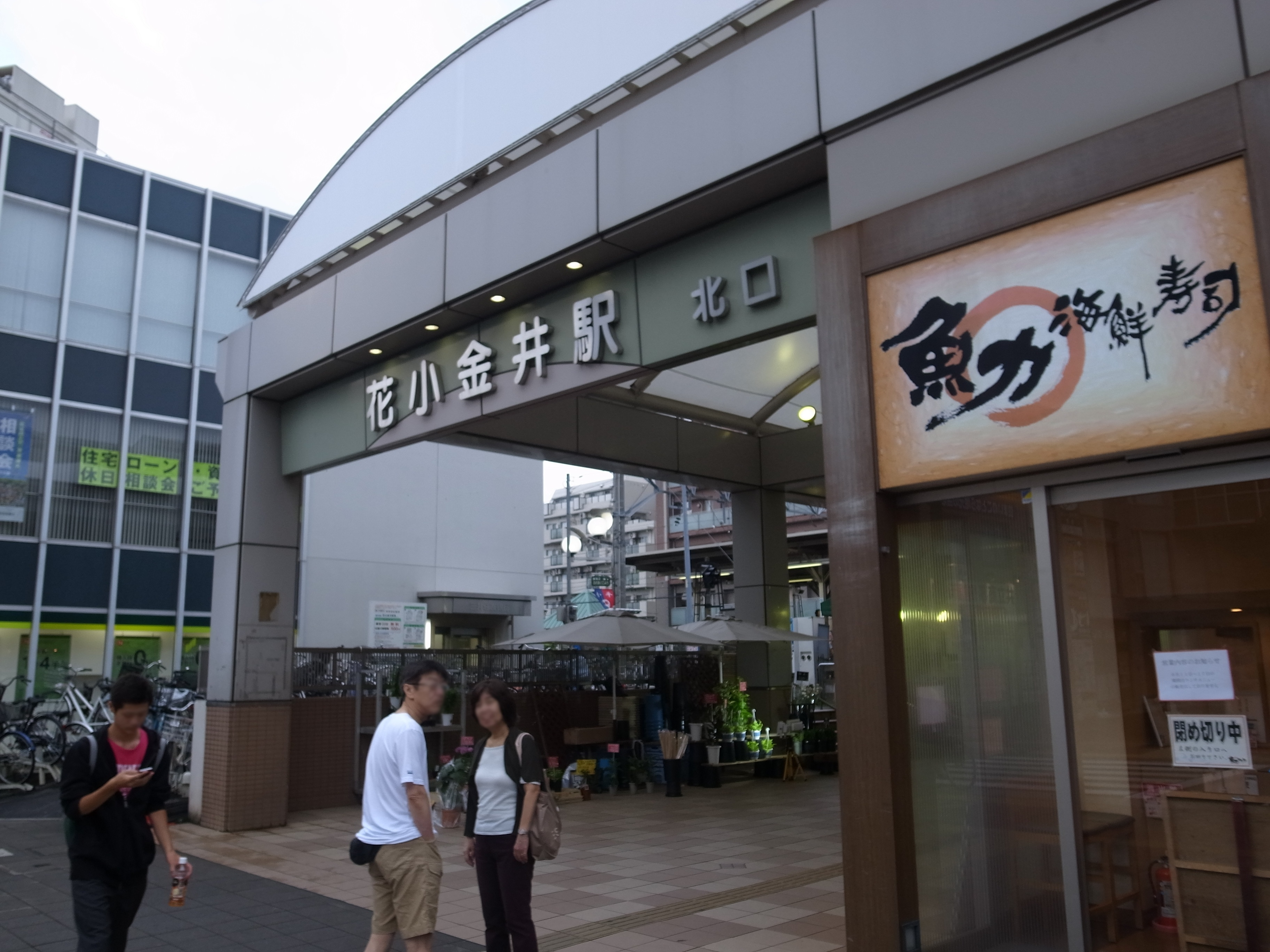 花小金井駅の北口